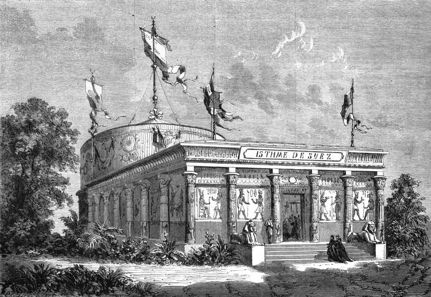 "Vue extérieure du pavillon de l'isthme de Suez. - M. Chapon, architecte. Dessin de M. Lancelot".